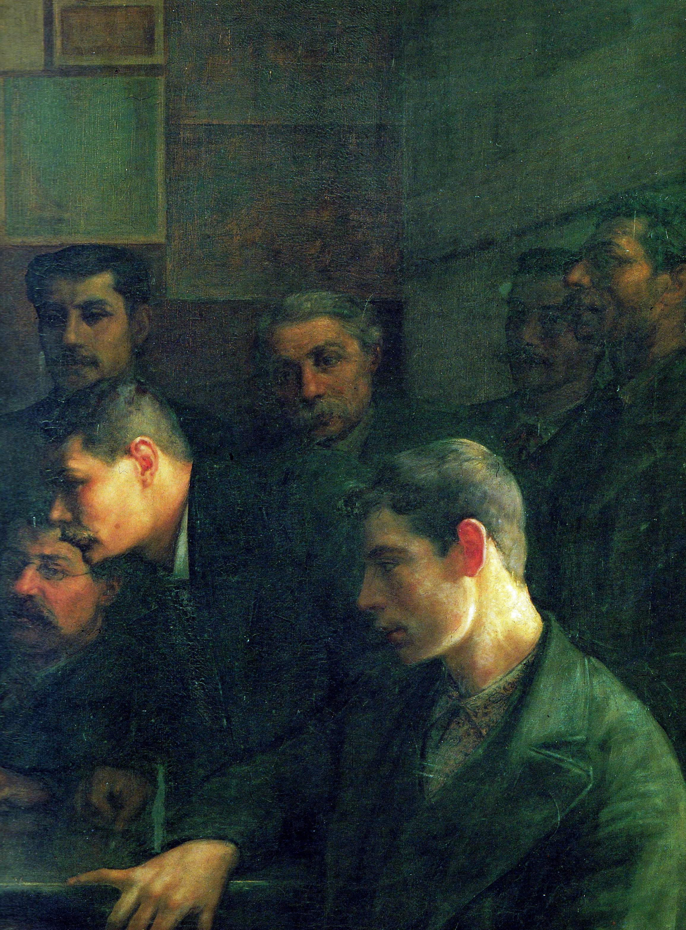 La foto rappresenta l'opera di Fra Paolo - Augusto Mussini descritta nel titolo, conservata nella chiesa dei Cappuccini di Ascoli Piceno.